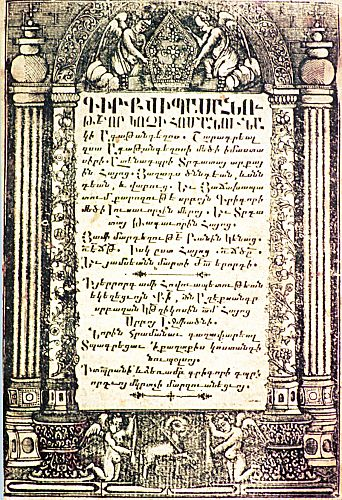 Страница издания «Истории» армянского автора V века Агатангехоса